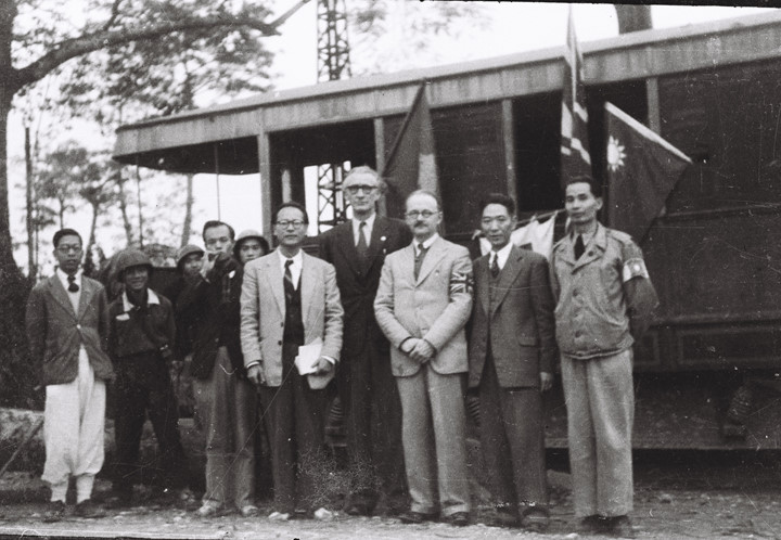 Đoàn đại-biểu chính-phủ Việt-nam cùng lĩnh-sự các nước Anh, Mỹ, Tàu thương-thuyết ở địa-điểm gần ngã-tư Ô-Chợ-Dừa để nhân-dân Hà-nội được tản-cư khỏi vùng chiến, thời-điểm được ấn-định là 15 tháng 01 năm 1947. Phái-đoàn Việt-nam gồm các ông Hoàng-minh-Giám, Nguyễn-văn-Trân, Hoàng-hữu-Nam.